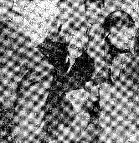 Piragine Niveyro, diputado de la Nación Argentina, es atendido tras sufrir un infarto en plena sesión del Congreso.